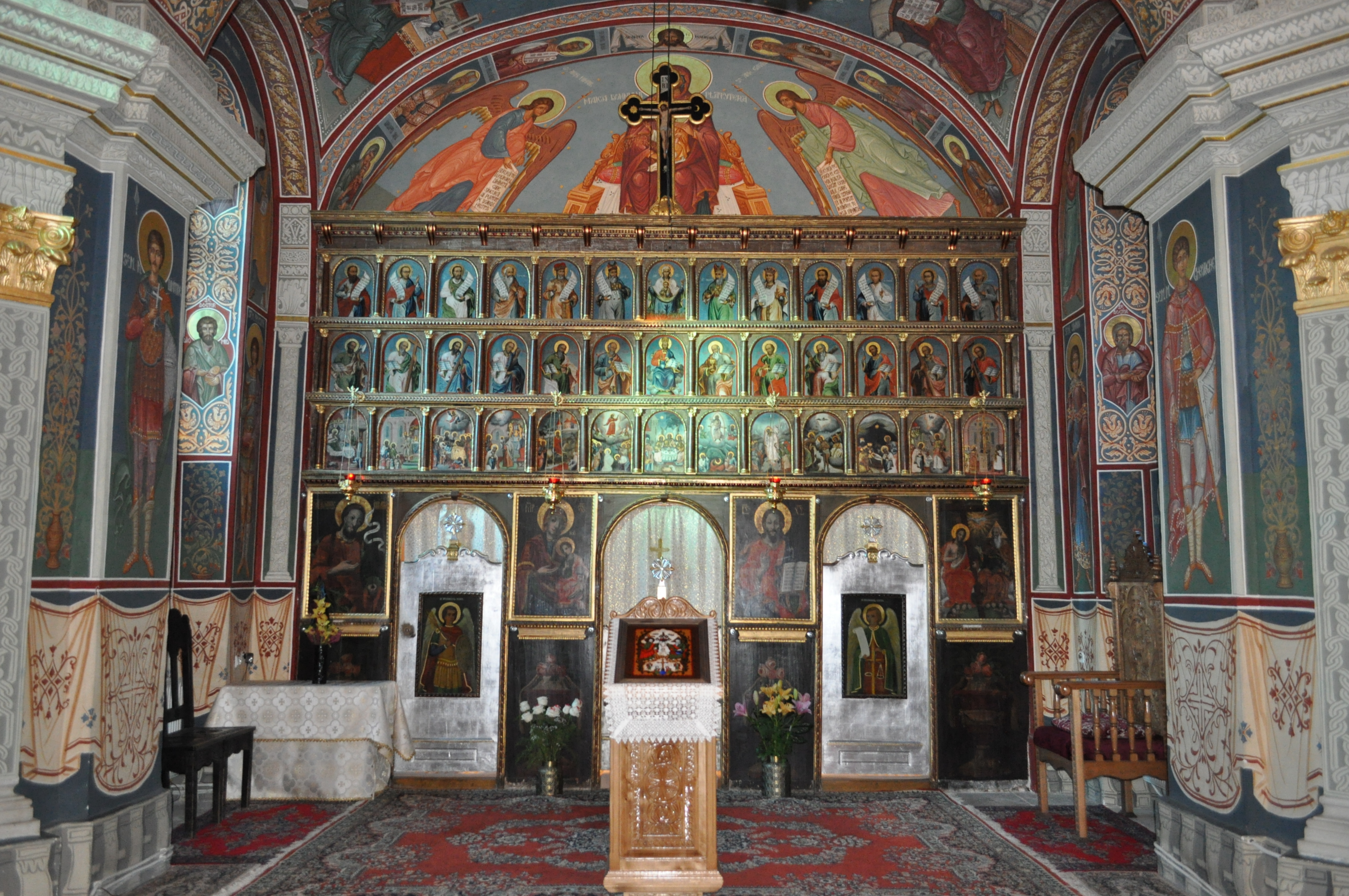 Biserica Ortodoxă Sf. Treime din Cluj